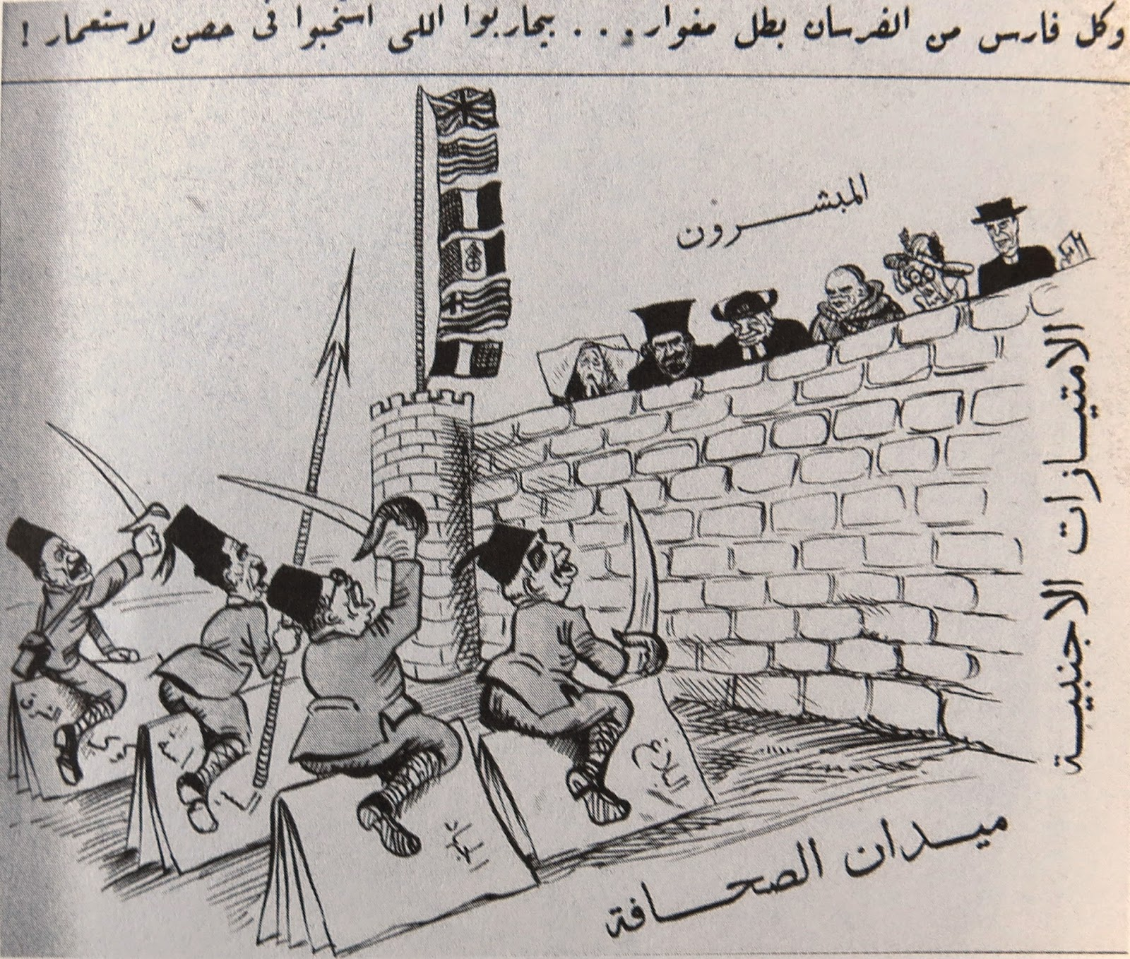 كاريكاتير من «اللطائف المصورة» عن ميدان الصحافة وجهاده المبشرين - «وكل فارس من الفرسان بطل مغوار بيحاربوا اللي استخبوا في حصن الاستعمار»